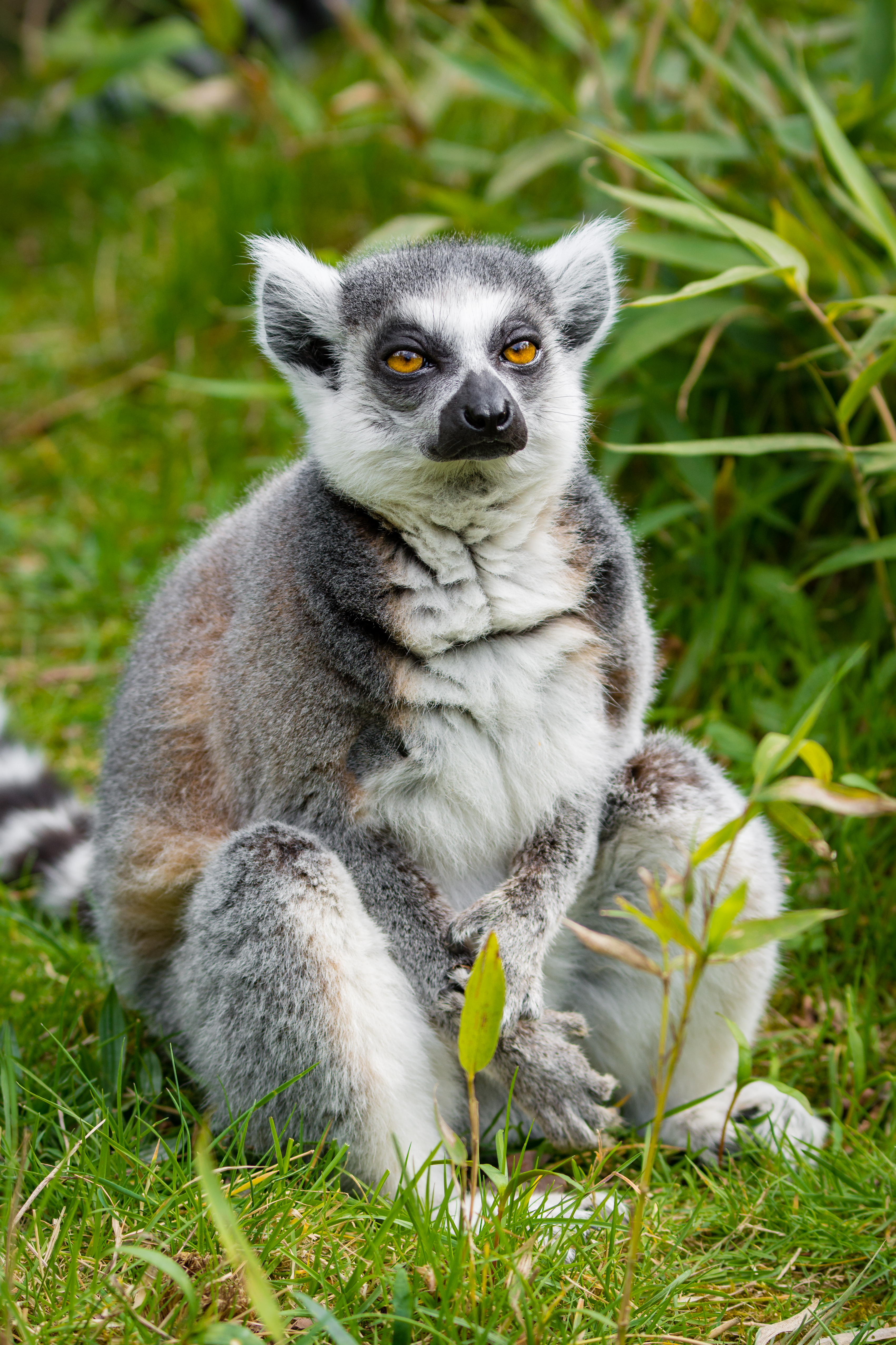 Lemur